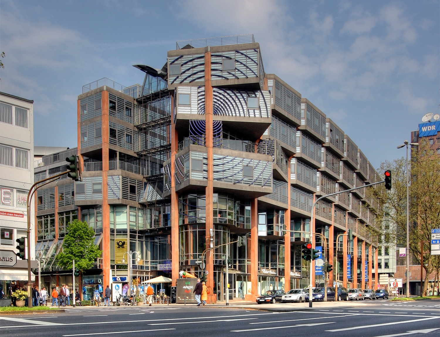 WDR-Arkaden Köln, Architekt: Gottfried Böhm